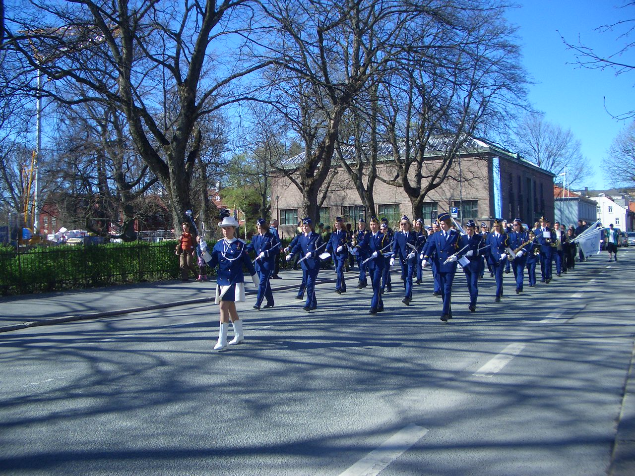 marsjparade i trondheim